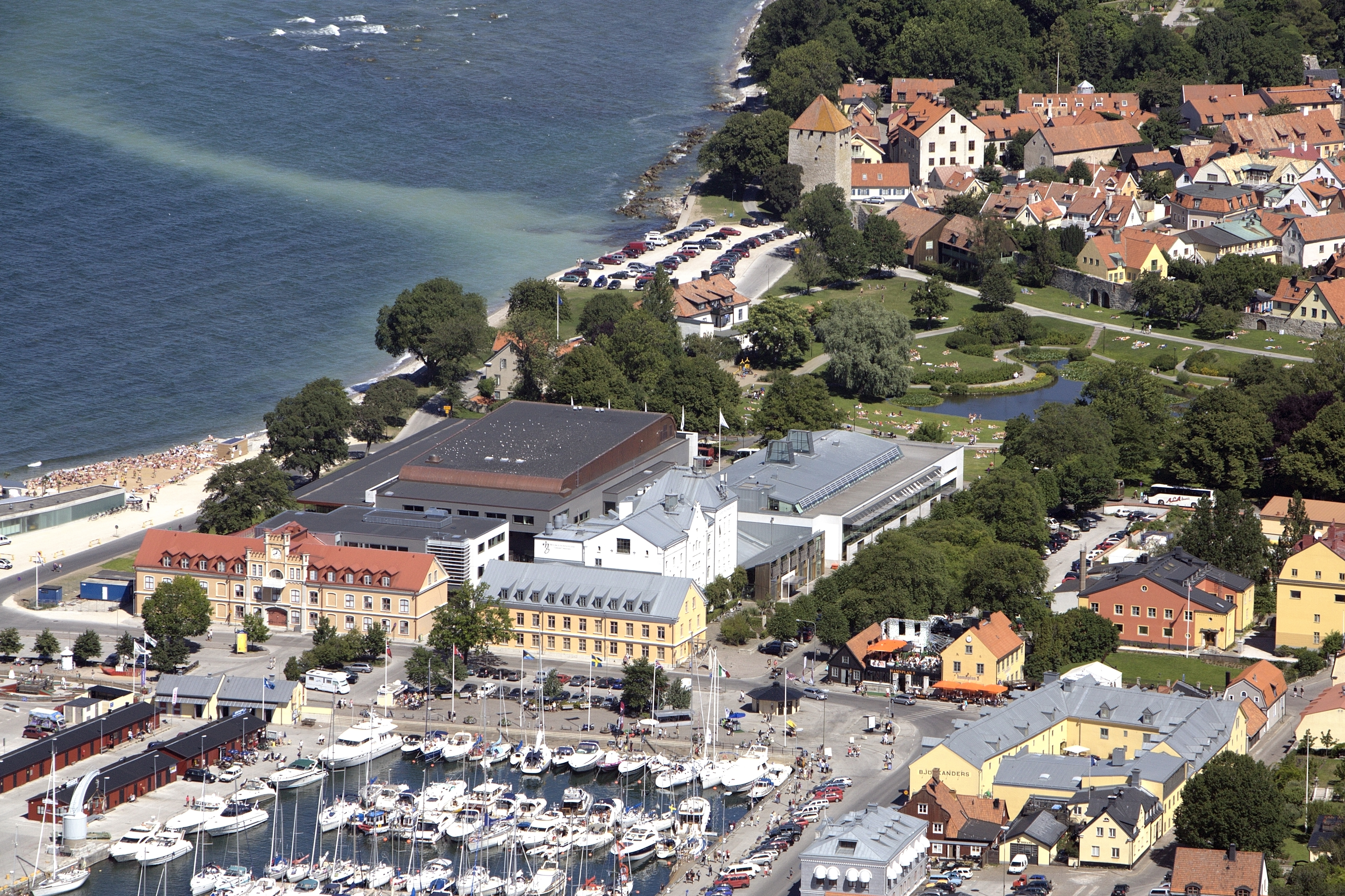 Uppsala universitet - Campus Gotland